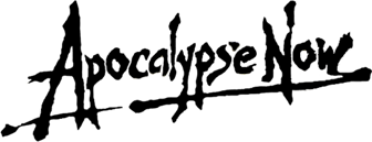 Fuente tipográfica "Apocalypse Now" con el escrito Apocalypse Now de la dirigida y producida por Francis Ford Coppola.